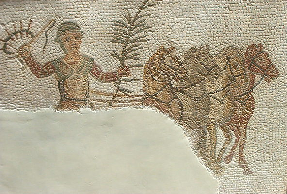 Aurige vainqueur, mosaïque de Thuburbo Majus, IVe siècle, au Musée du Bardo